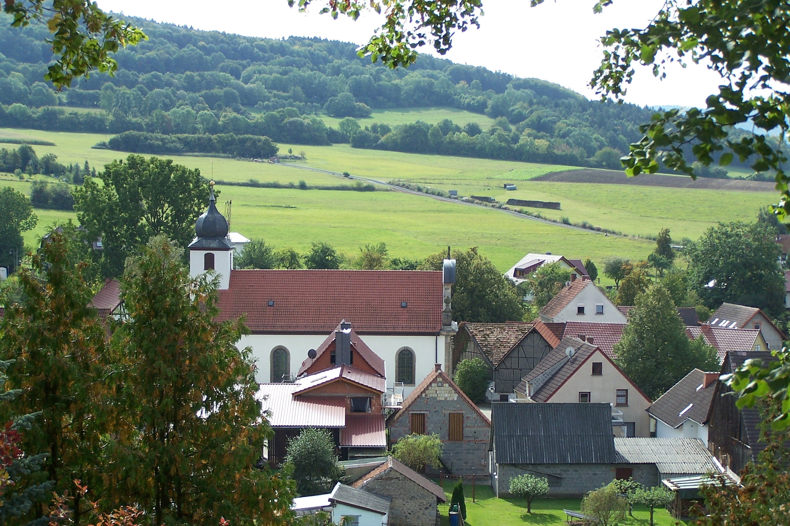 Ortsansicht von Norden (2012)